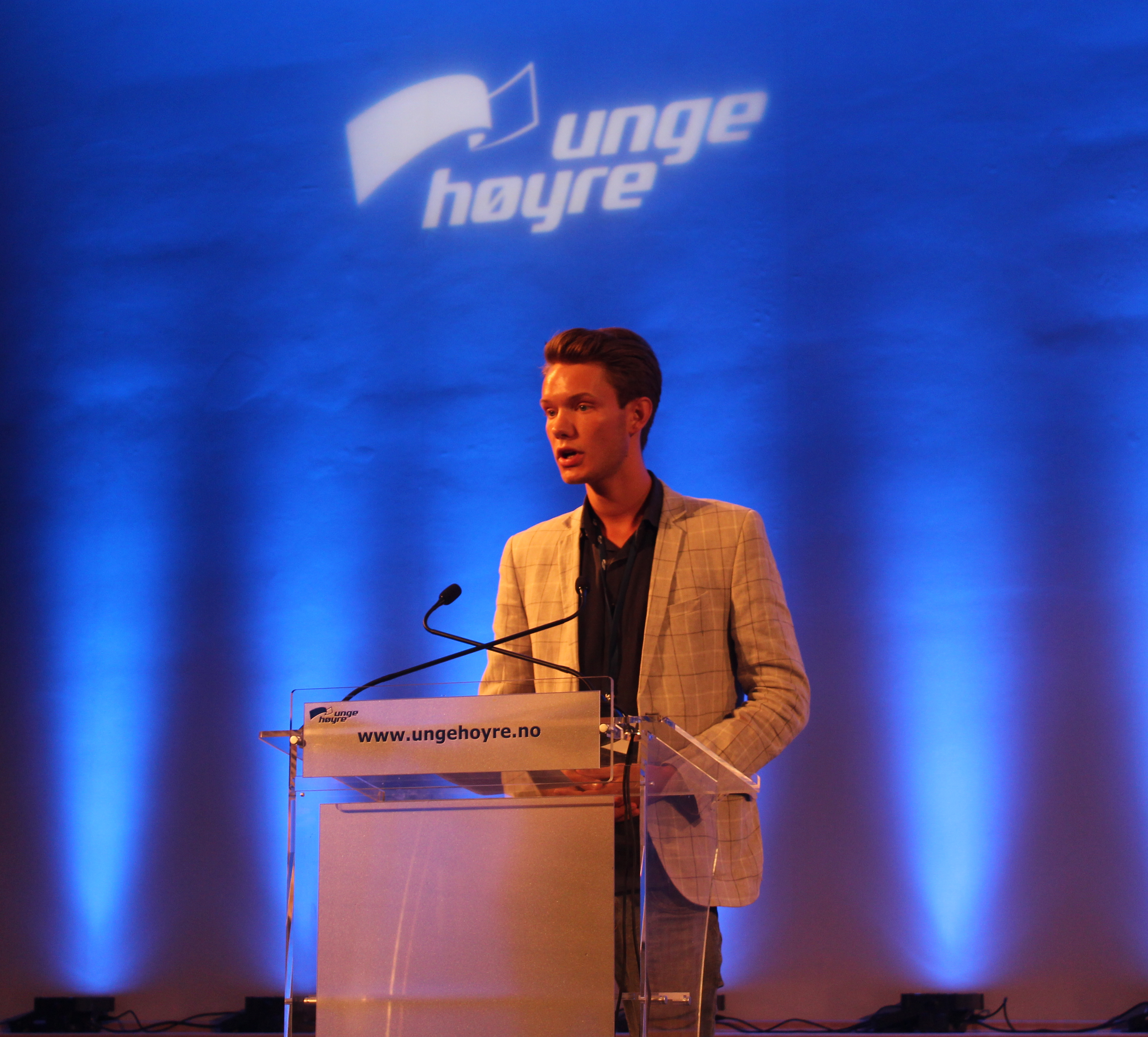 Leder av Akershus Unge Høyre i 2014, Haakon Kvenna Veum, på talerstolen under Unge Høyres landsmøte.